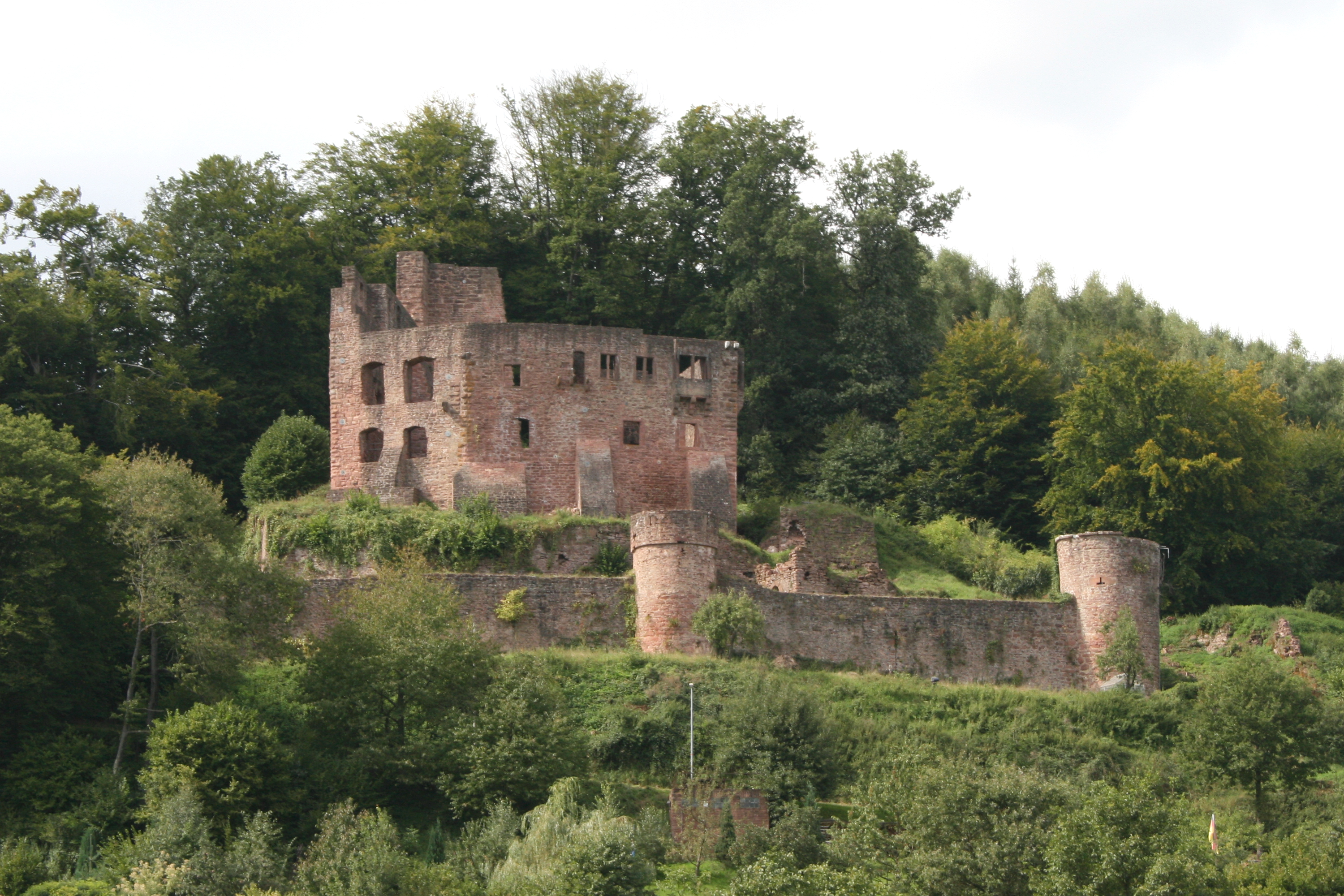 Ansicht der Burg Freienstein bei Gammelsbach im Odenwaldkreis, Hessen. Blick von Osten.